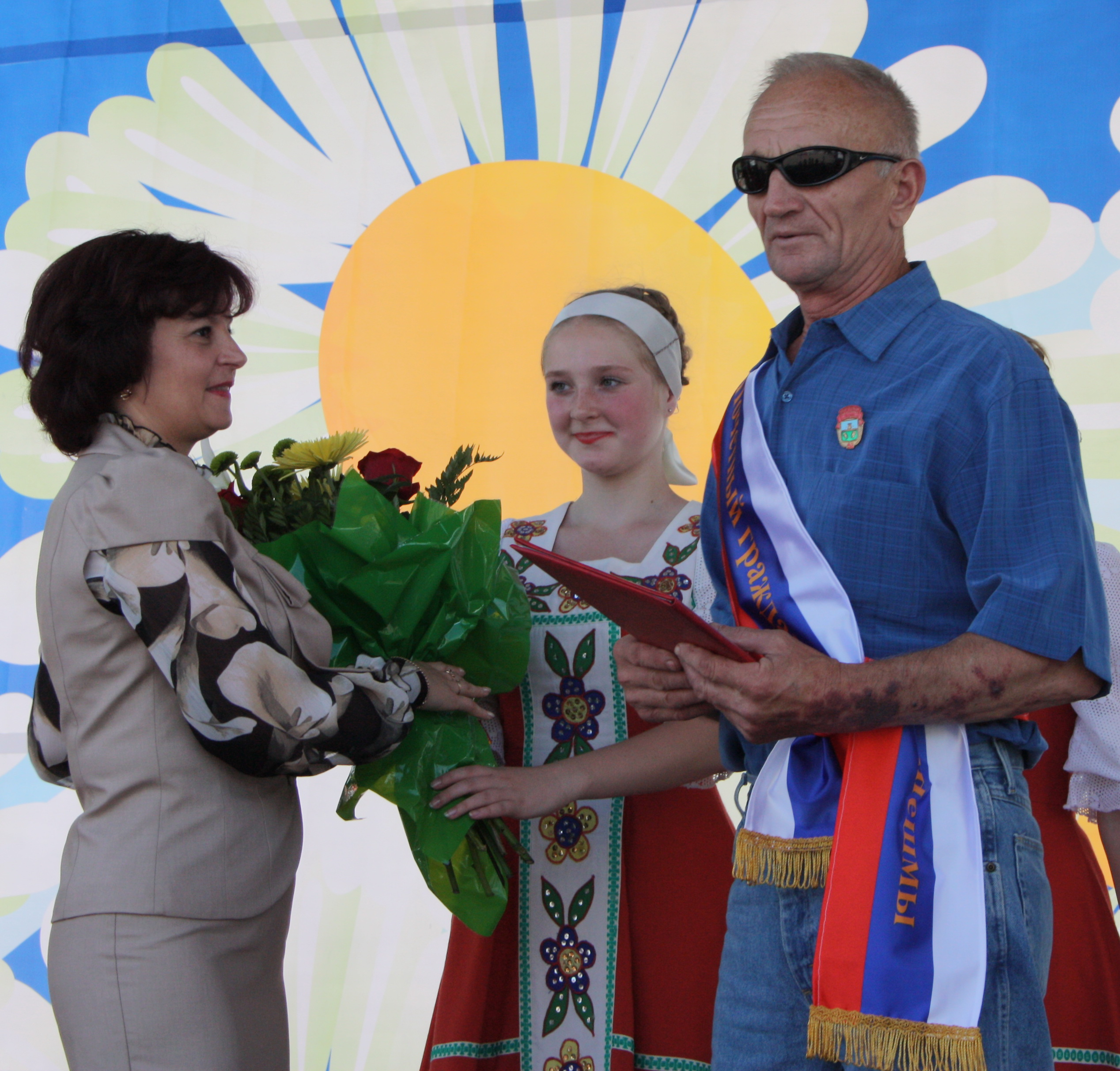 Присвоение звание "Почетный гражданин Кинешмы" в 2011 году